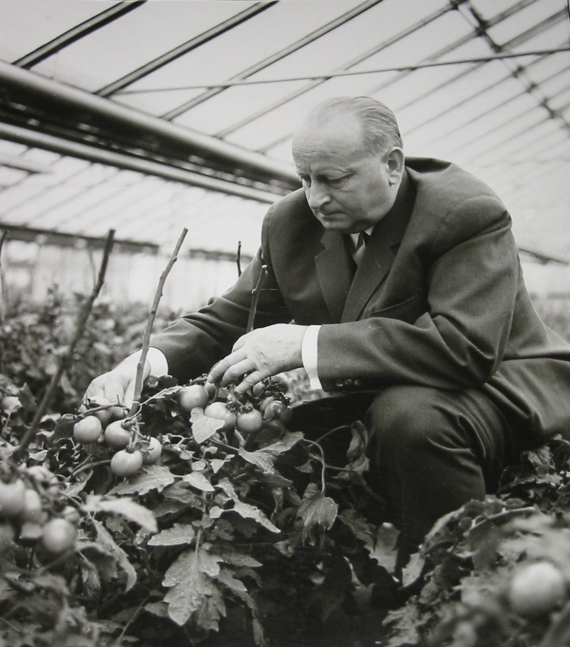 Mészöly Gyula növénynemesítő a paradicsomokkal.